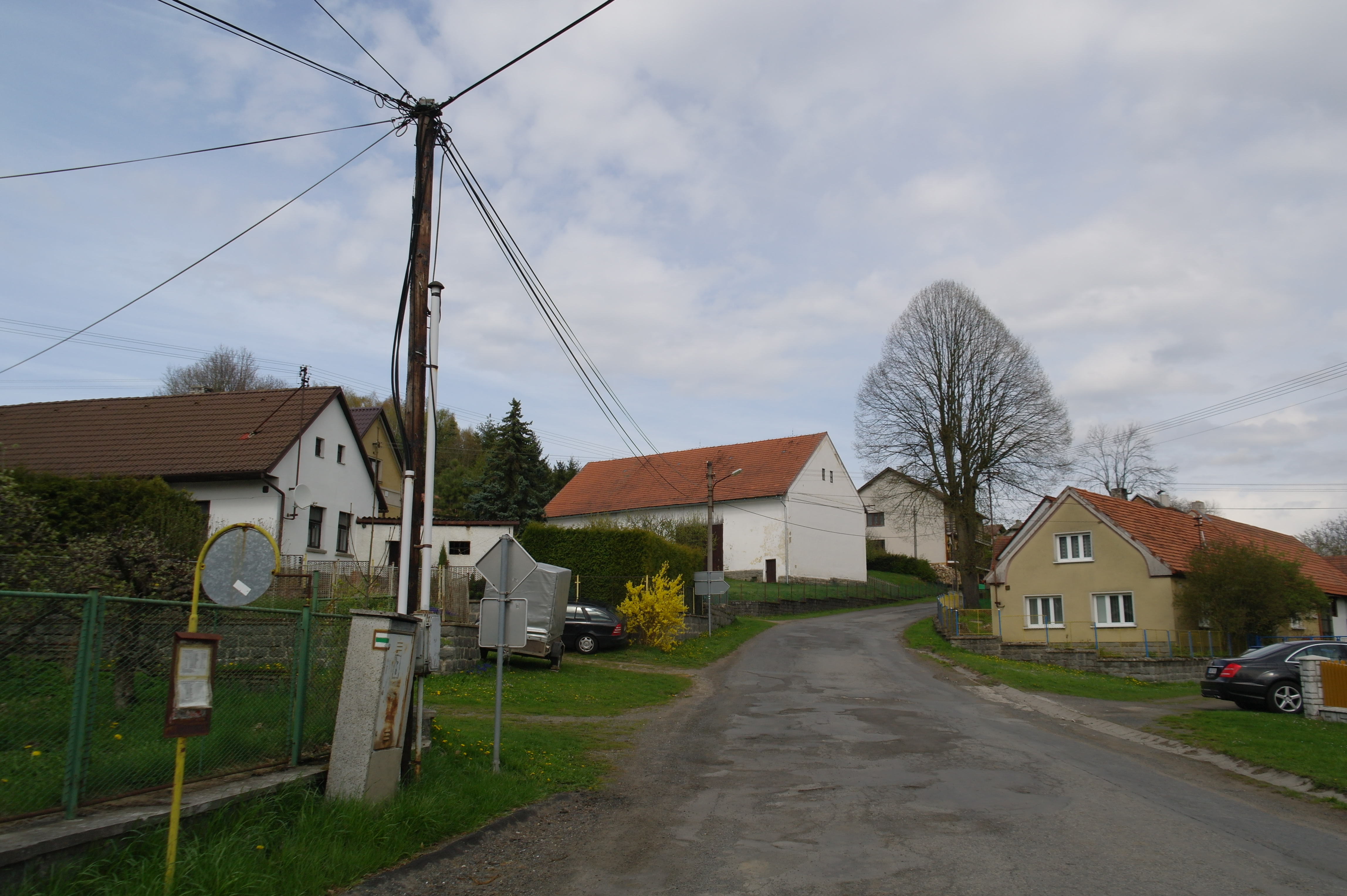 Nehodiv